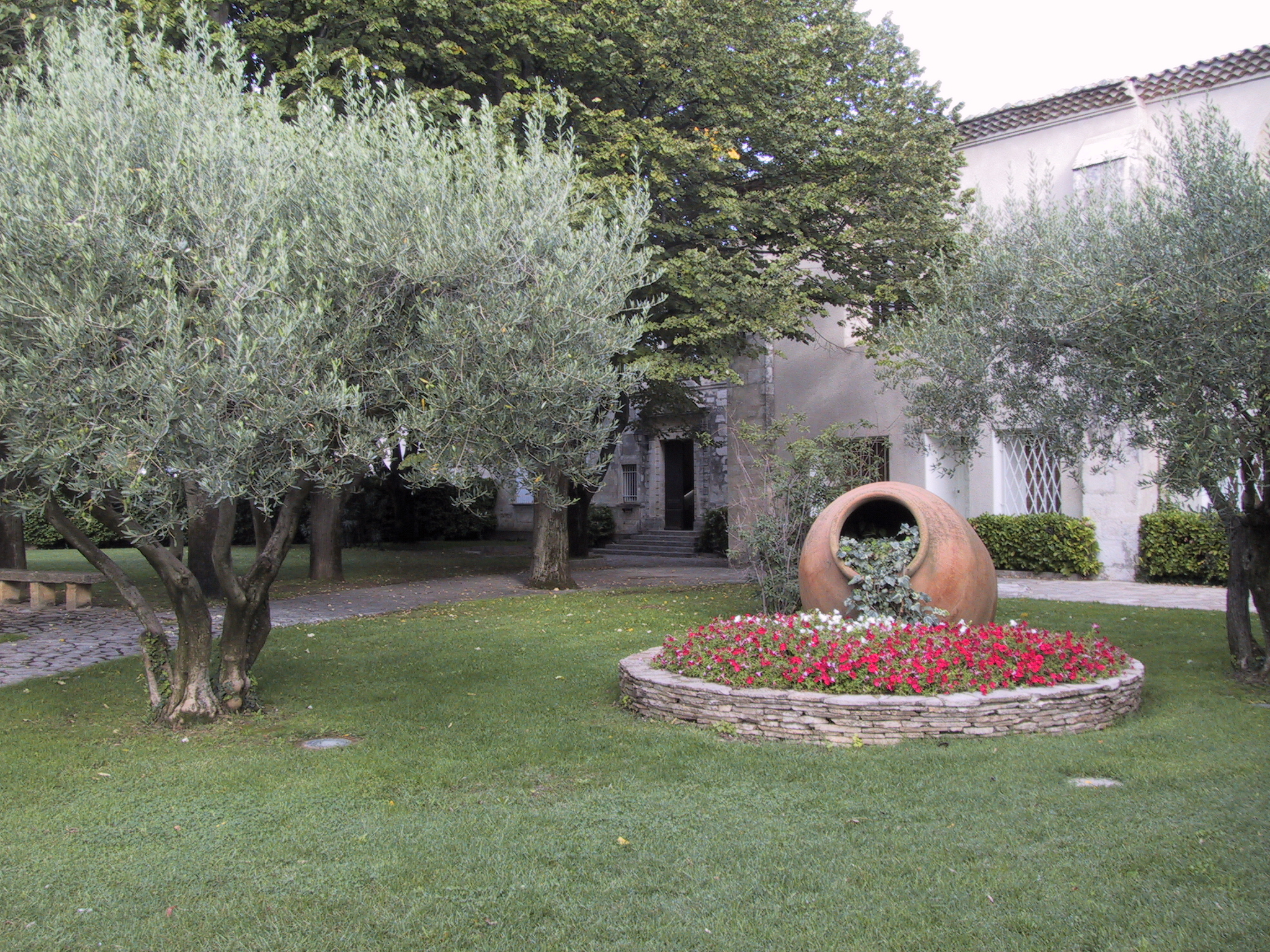 Le jardin de la mairie de Garons, France. L'image présente une pelouse arborée avec un parterre de fleurs. A l'arrière on distingue le batiment abritant l'hotel de ville.